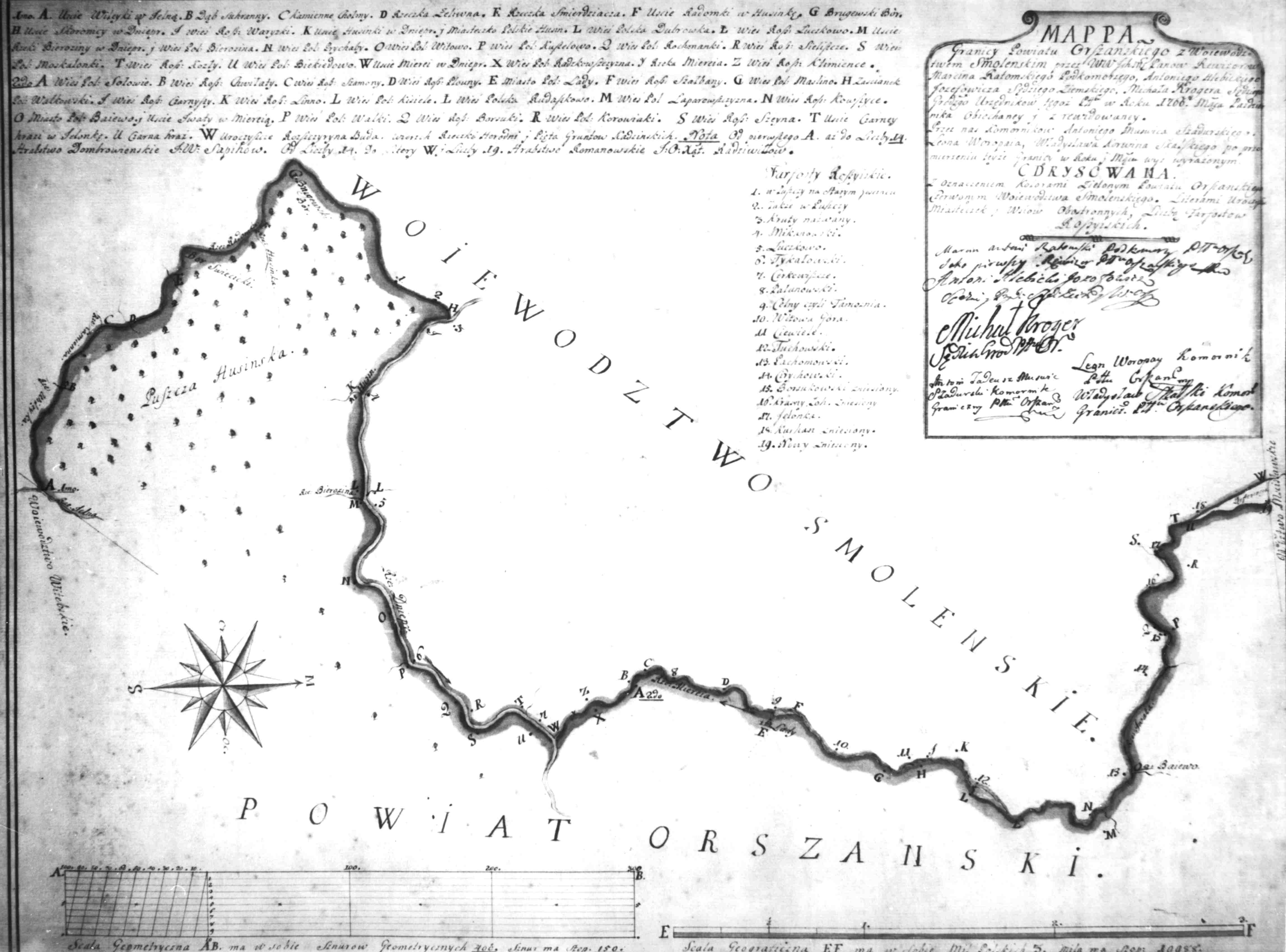 Беларуская (тарашкевіца): Мапа граніцы Аршанскага павету і Смаленскага ваяводзтва